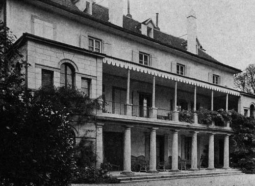 Château de Valeyres sous Rance